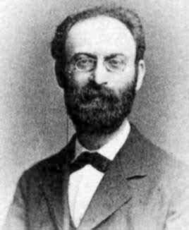 Retrat de Moritz Pasch (1843-1930), matemàtic alemany